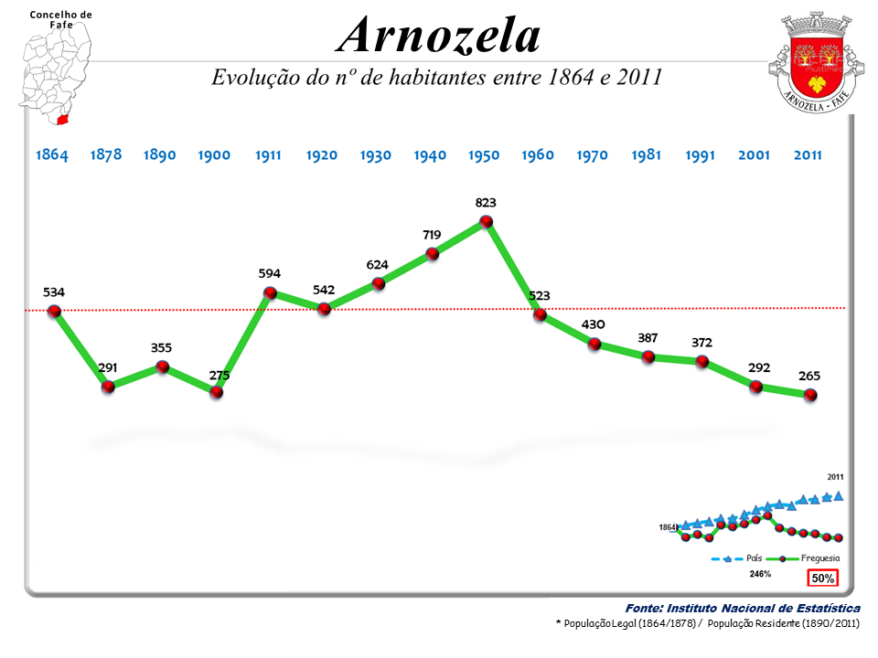 Censos 1864/2011